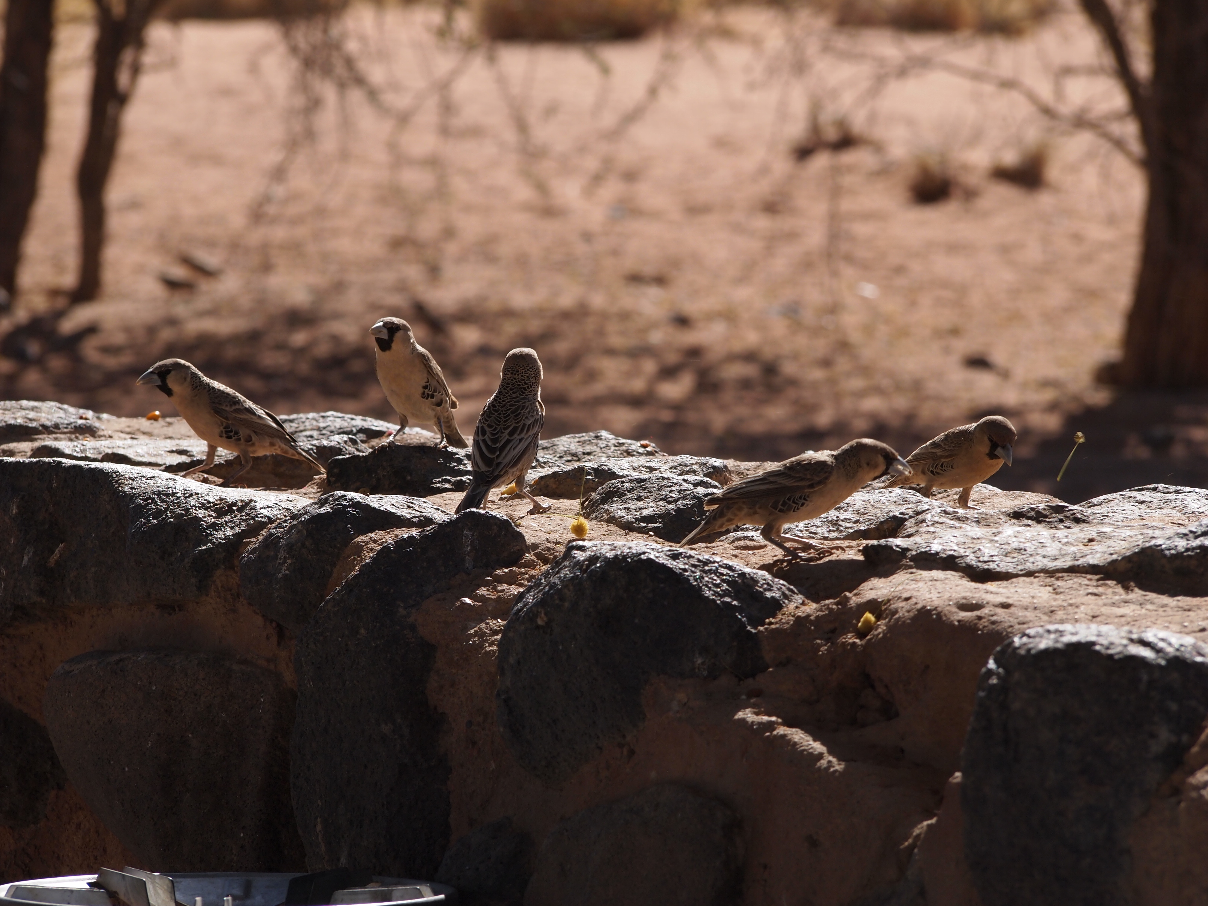 Républicain social (Philetairus socius) - Groupe vu à Solitaire, en Namibie